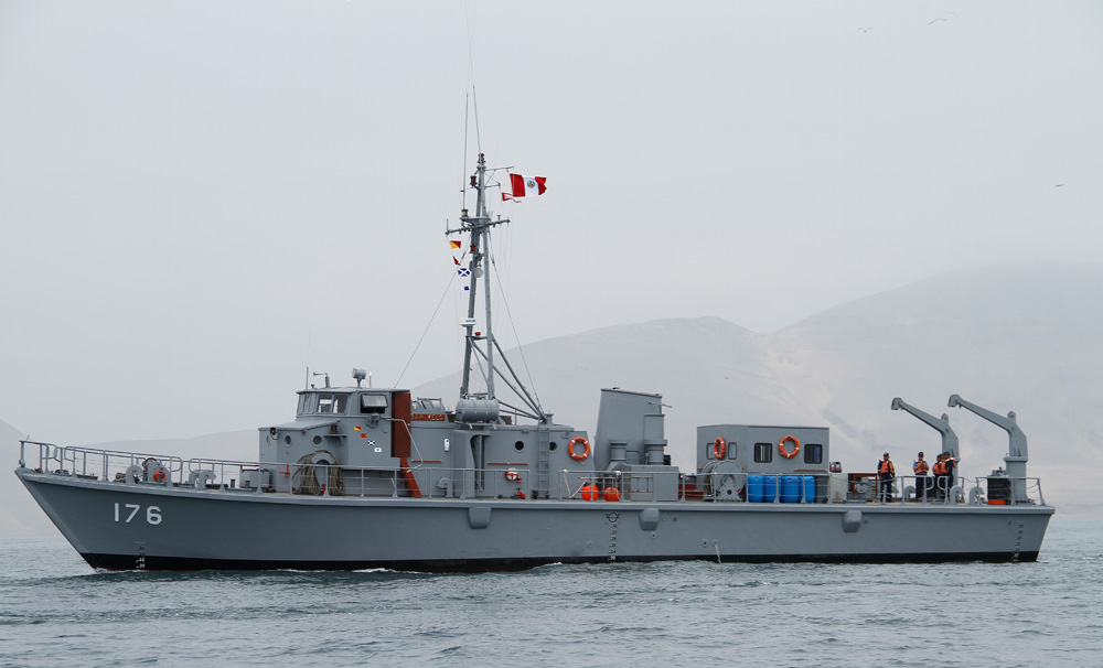 El buque hidrográfico peruano BAP Melo AH-76